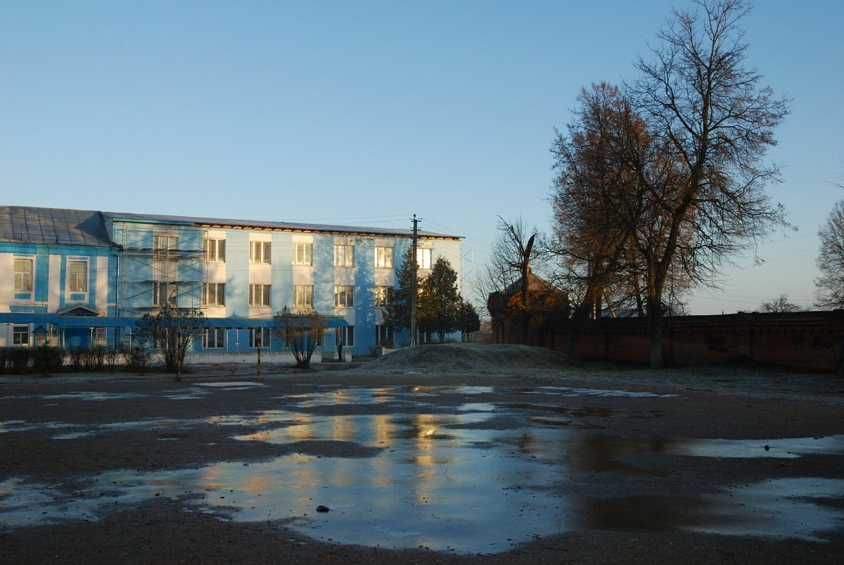 Мсціслаў. Замалёўкі